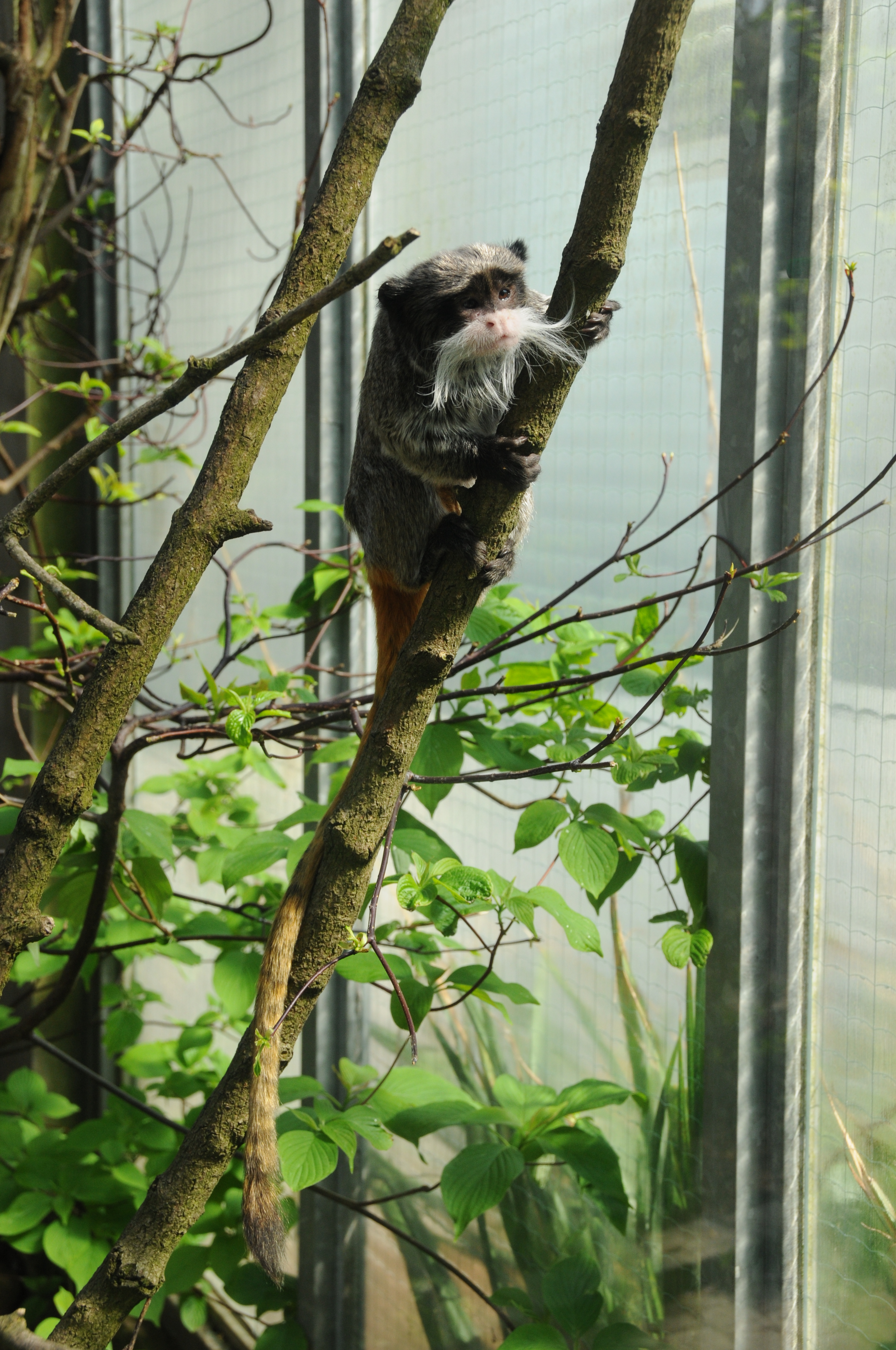 Saguinus imperator subgrisescens